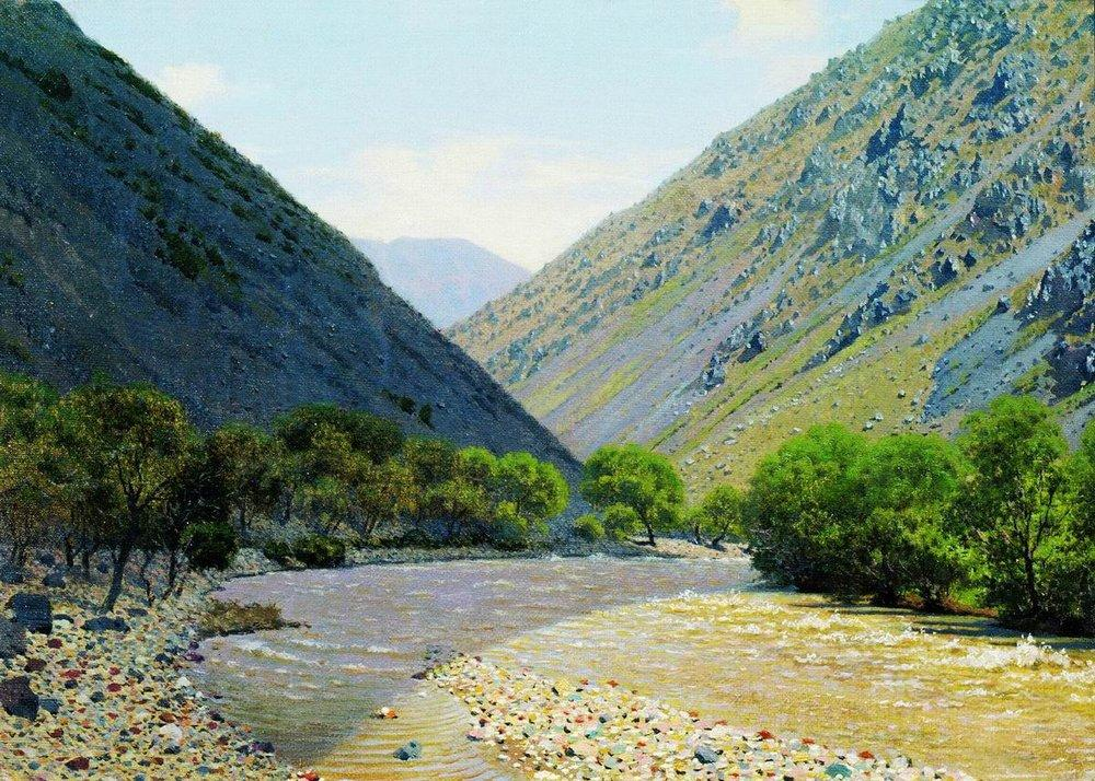 Проход Барскаун